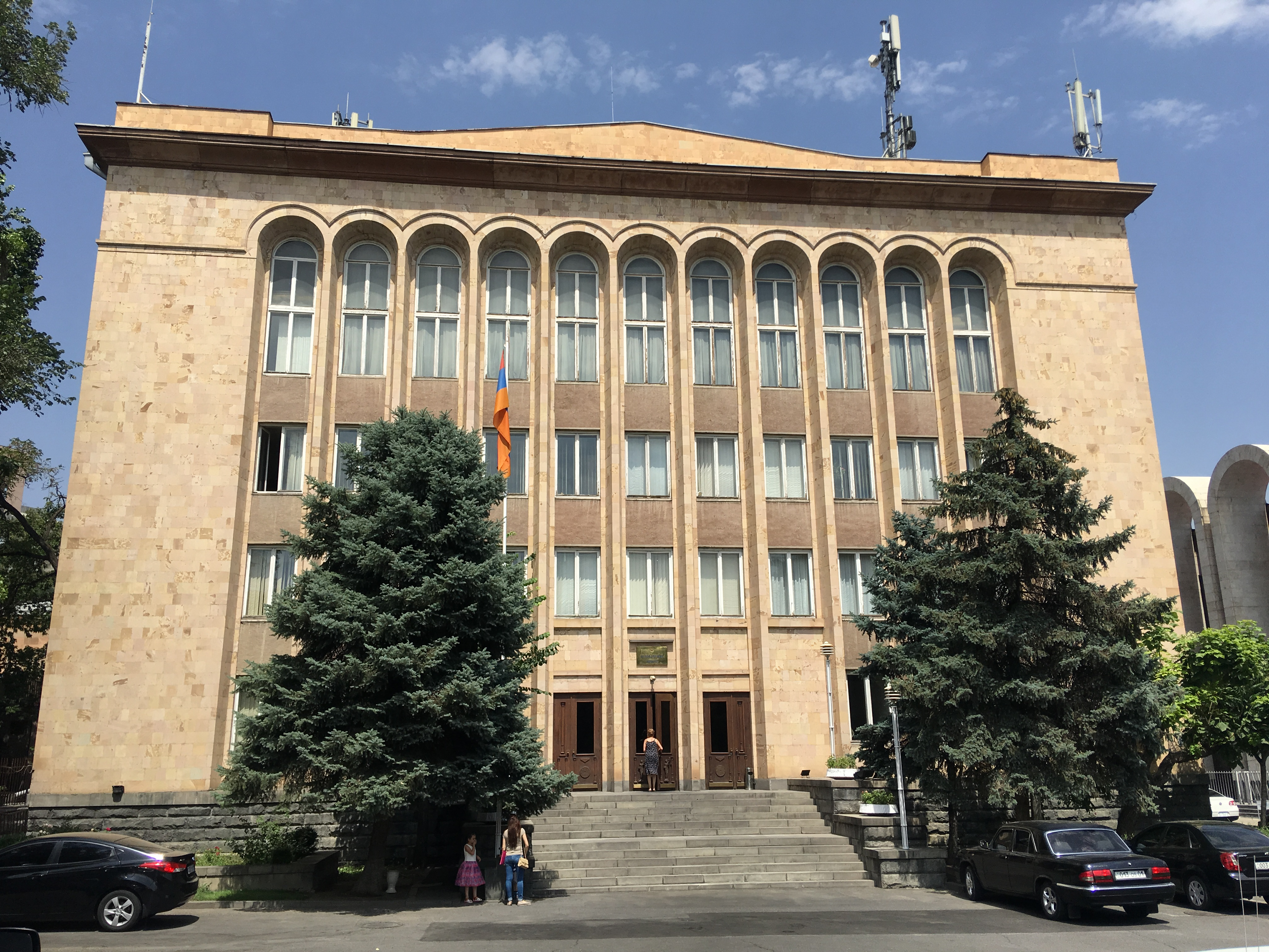 ՀՀ ՍԴ շենք, Երևան